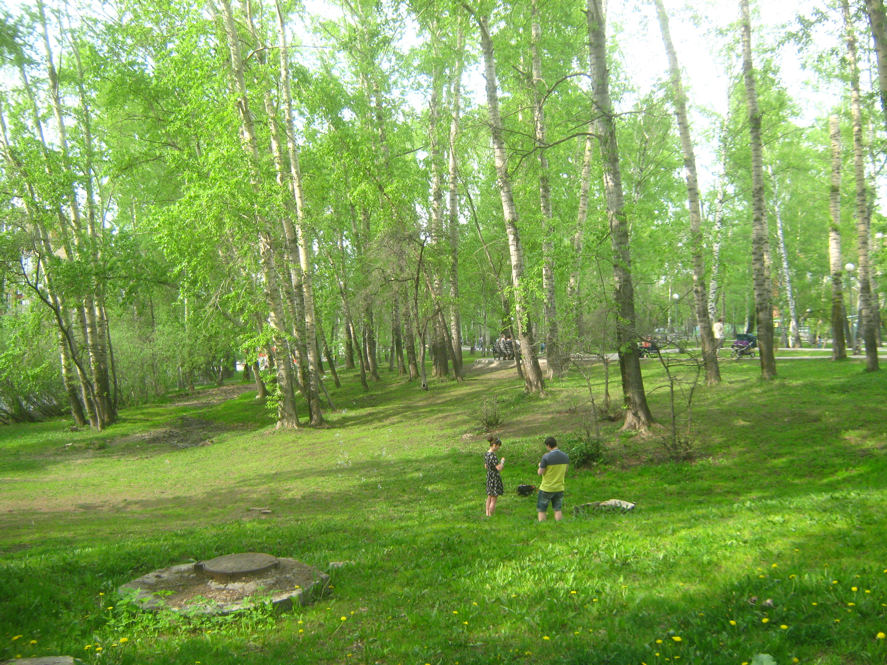 Буфф-сад, Томск This image is related to the protected area of Russia number 7020168